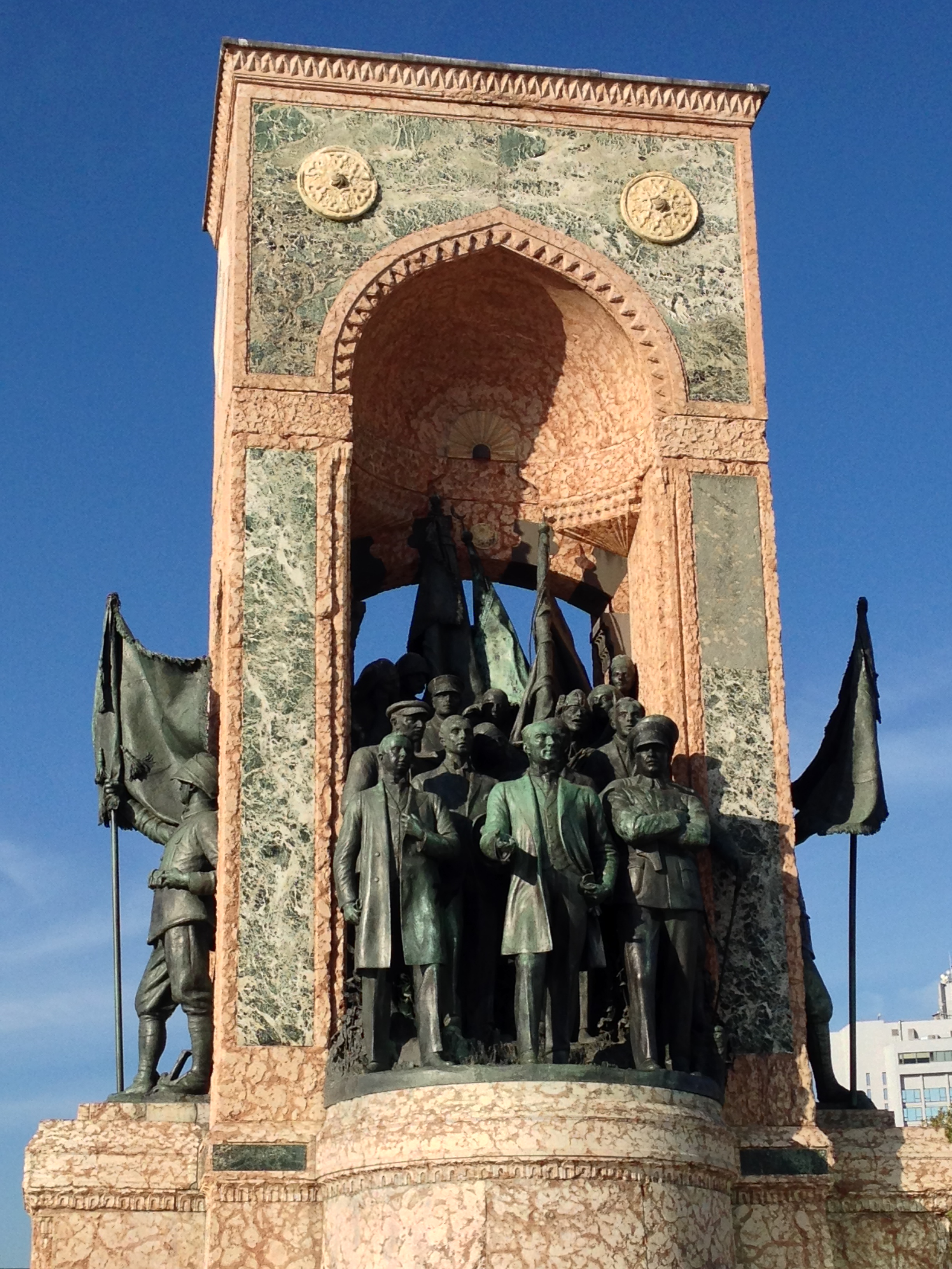 Monument of the Republic, Istanbul (Turkey). Work by Pietro Canonica.